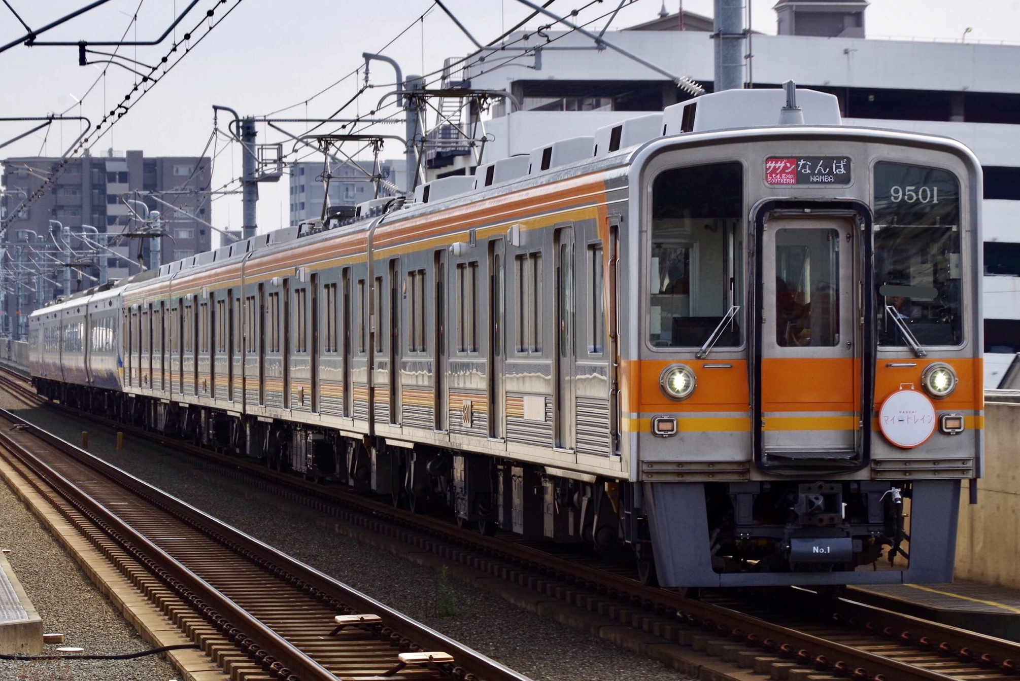 特急サザンの運用に就く南海9000系9501F(更新車)